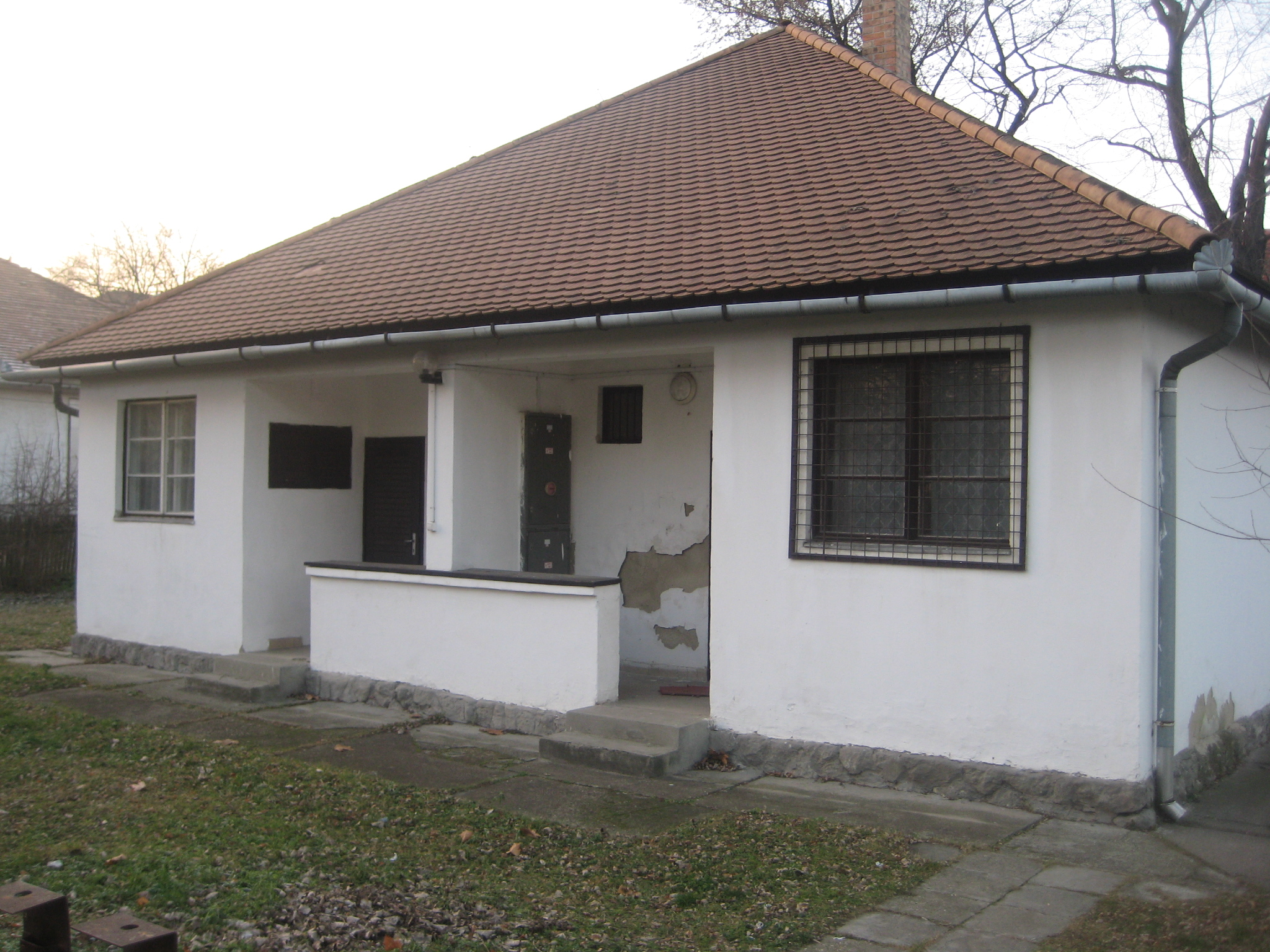 A dorogi bányász emlékház.